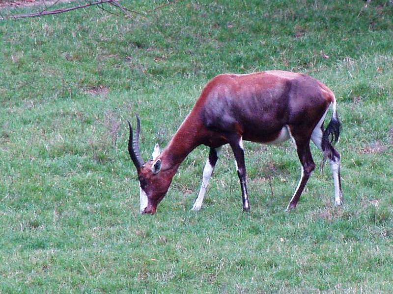 Damaliscus pygargus phillipsi (Prague Zoo)